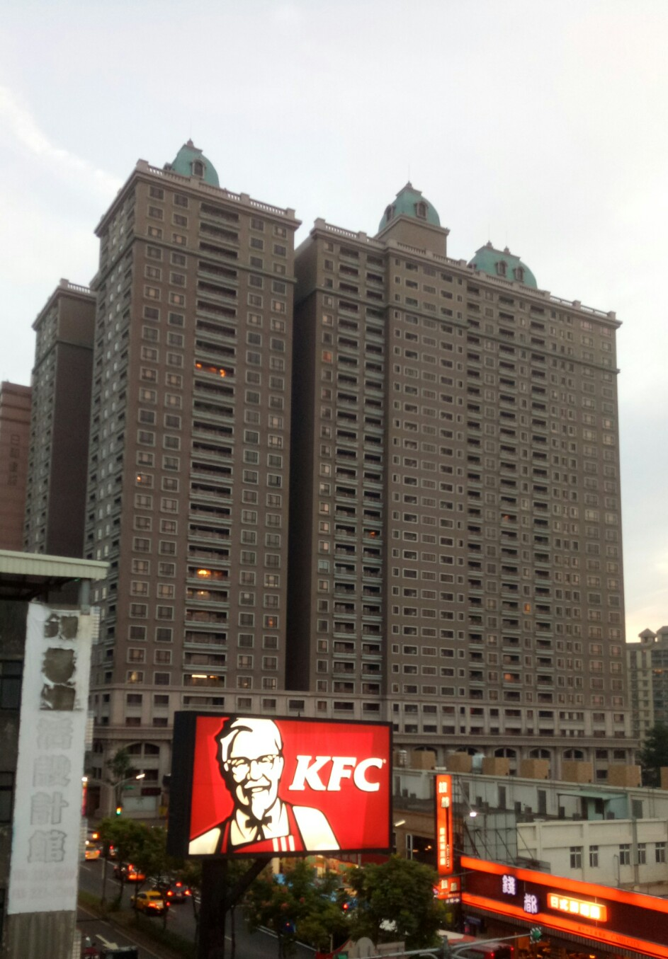 中悅帝寶為桃園市蘆竹區的高層建築。